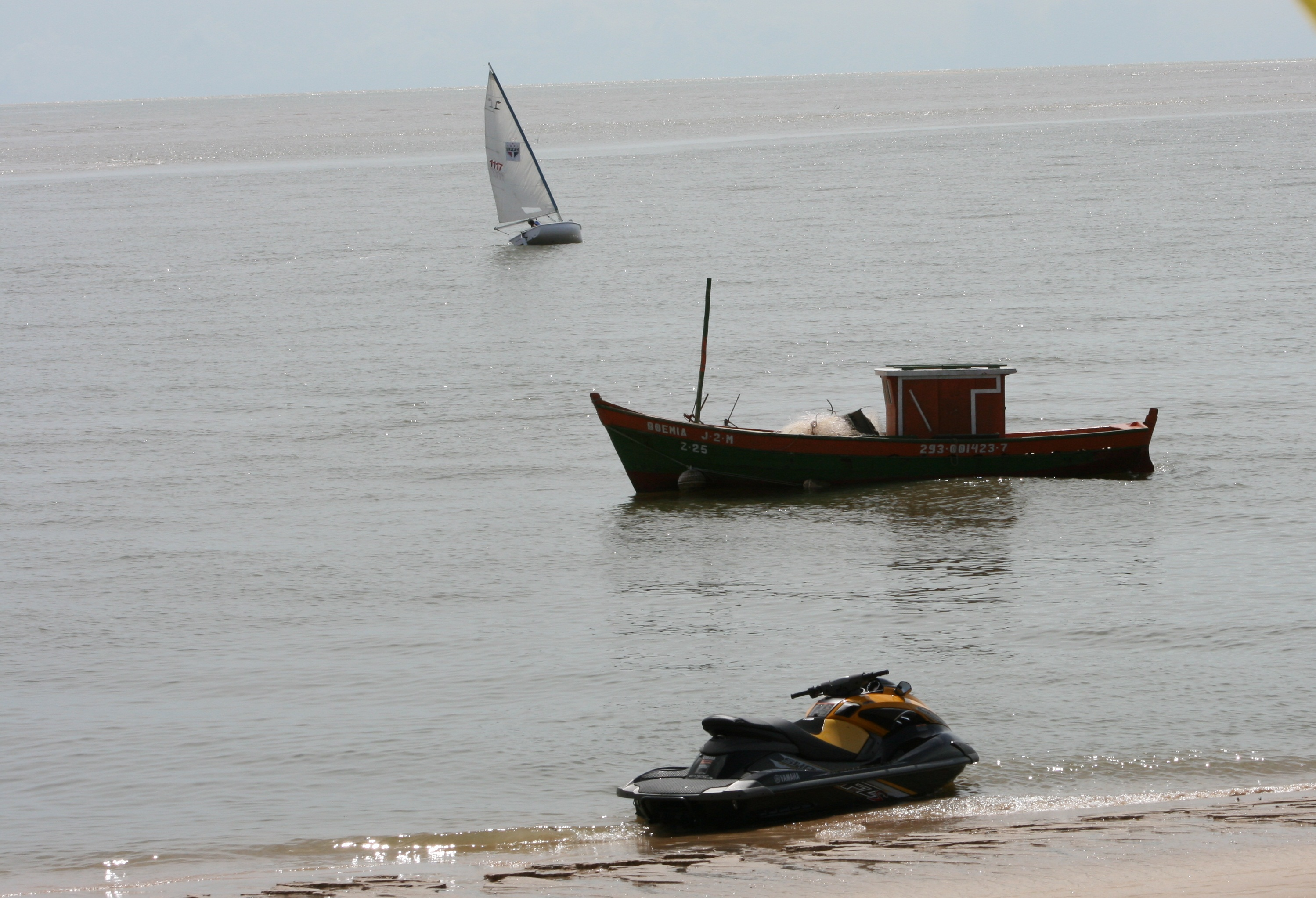 Nova Viçosa-BA